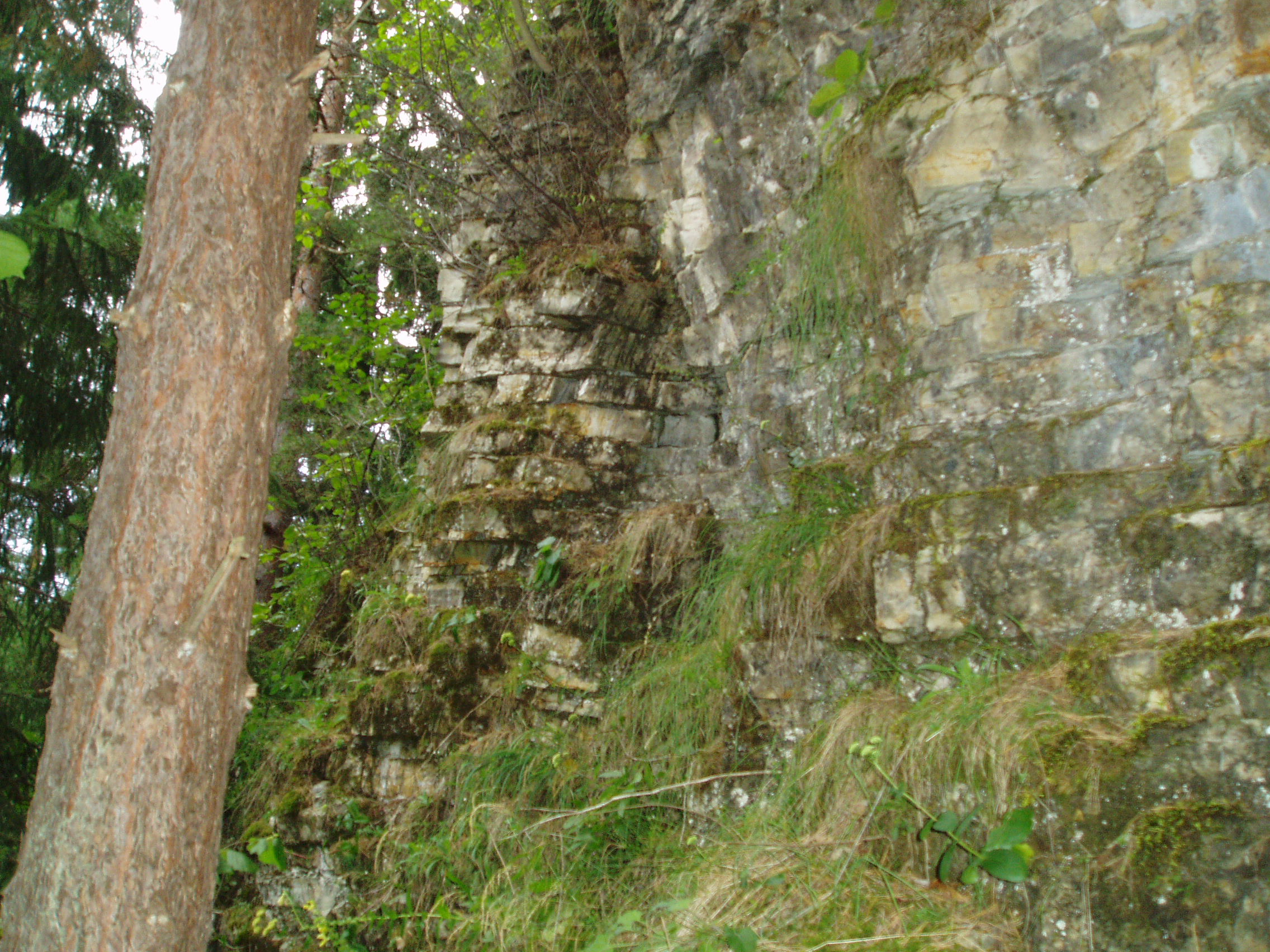 Dogérske skaly